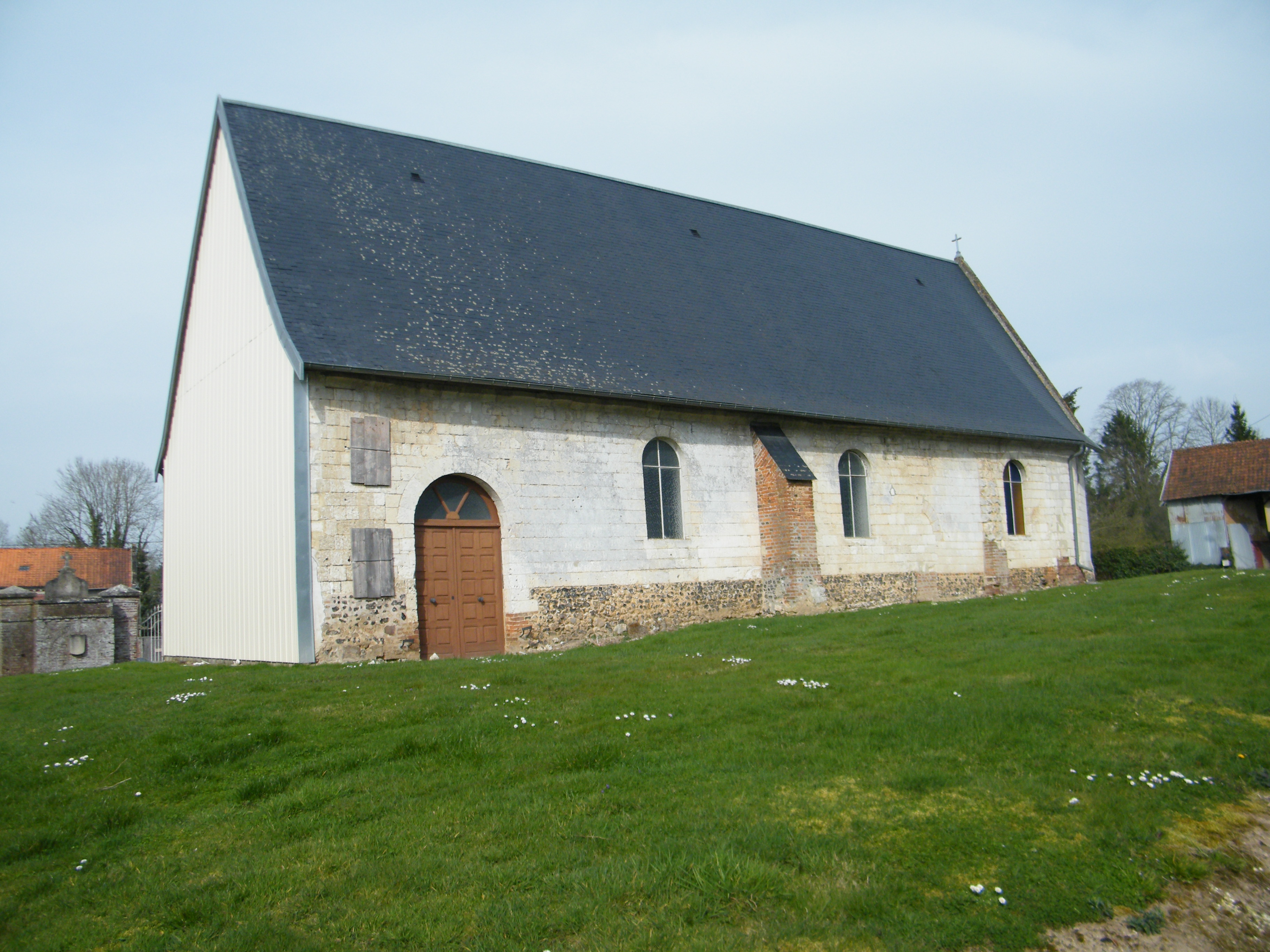 L'église sans son clocher (effondré) à Longvillers.